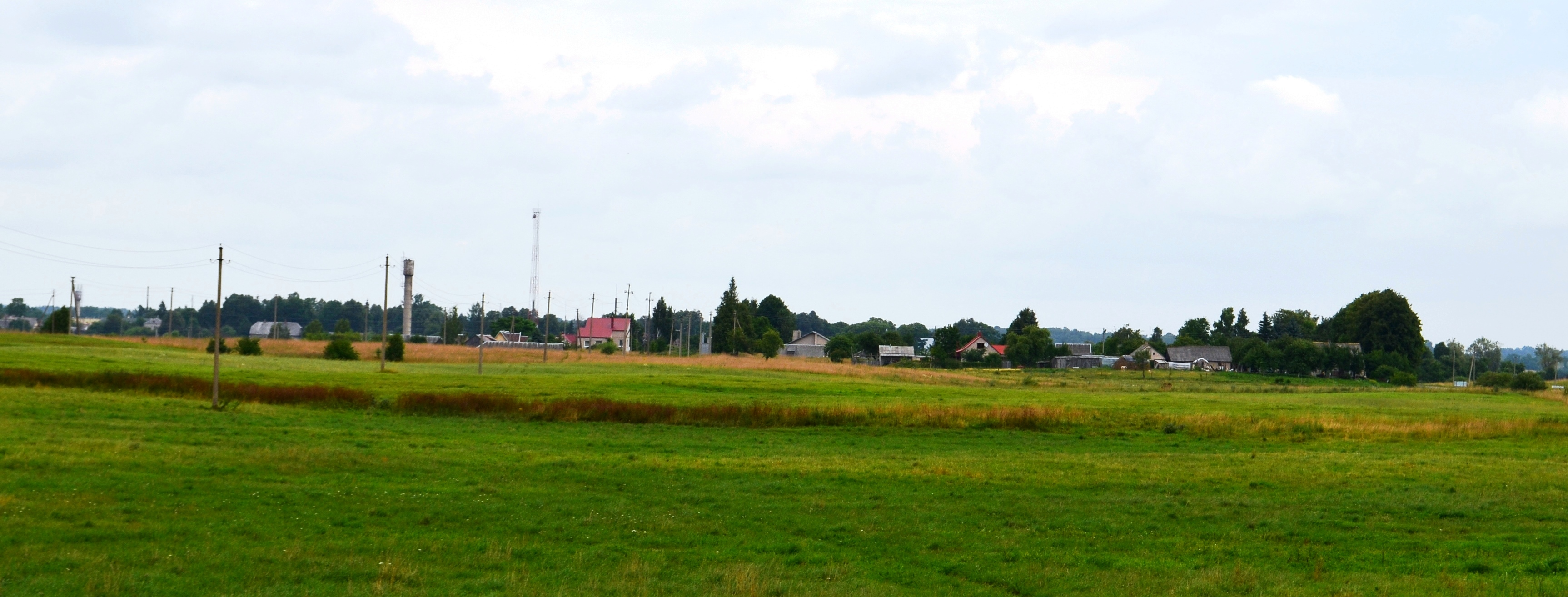 Varijatka, Molėtų r.